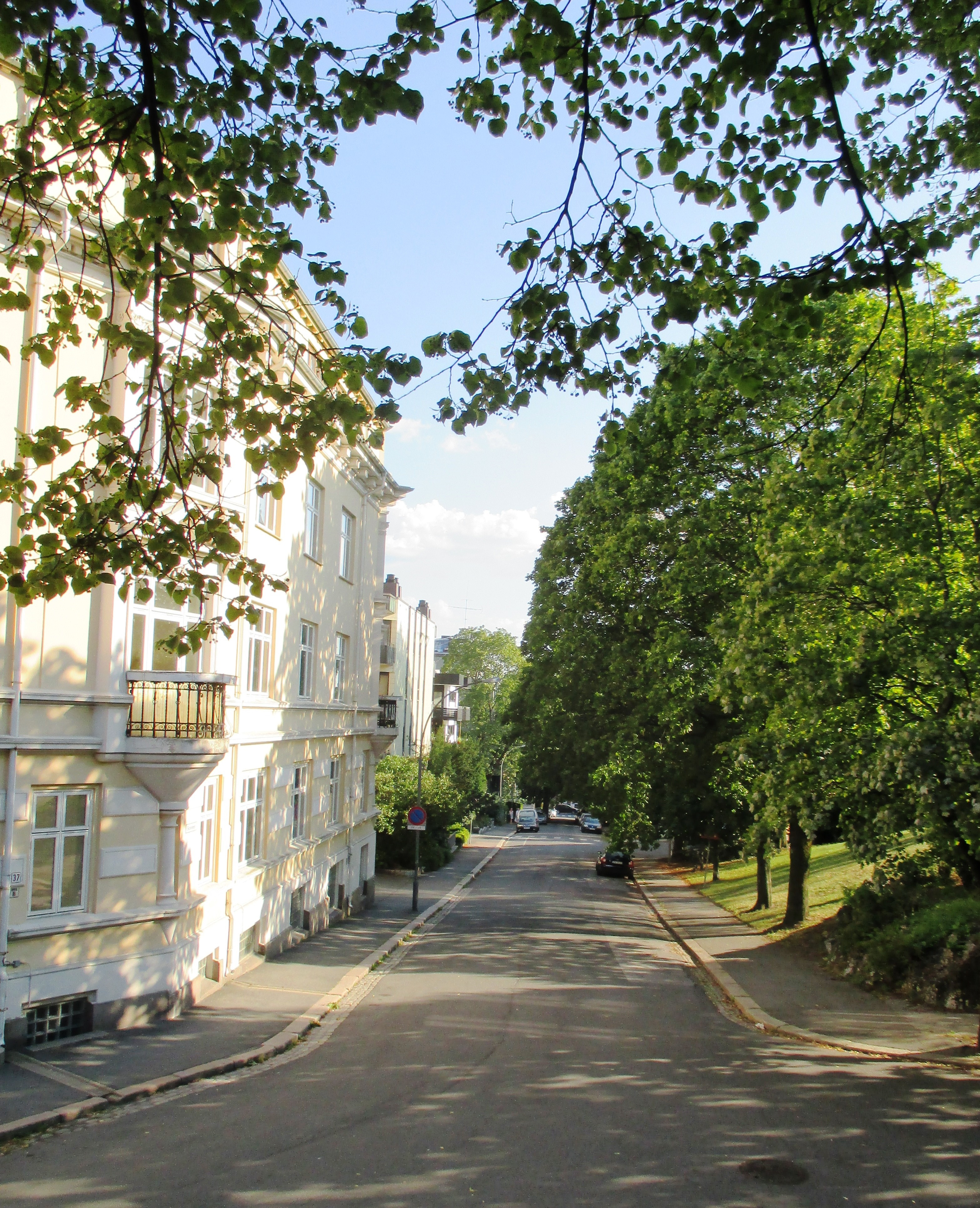 Øvre del av Skovveien opp mot baksiden av Uranienborg kirke